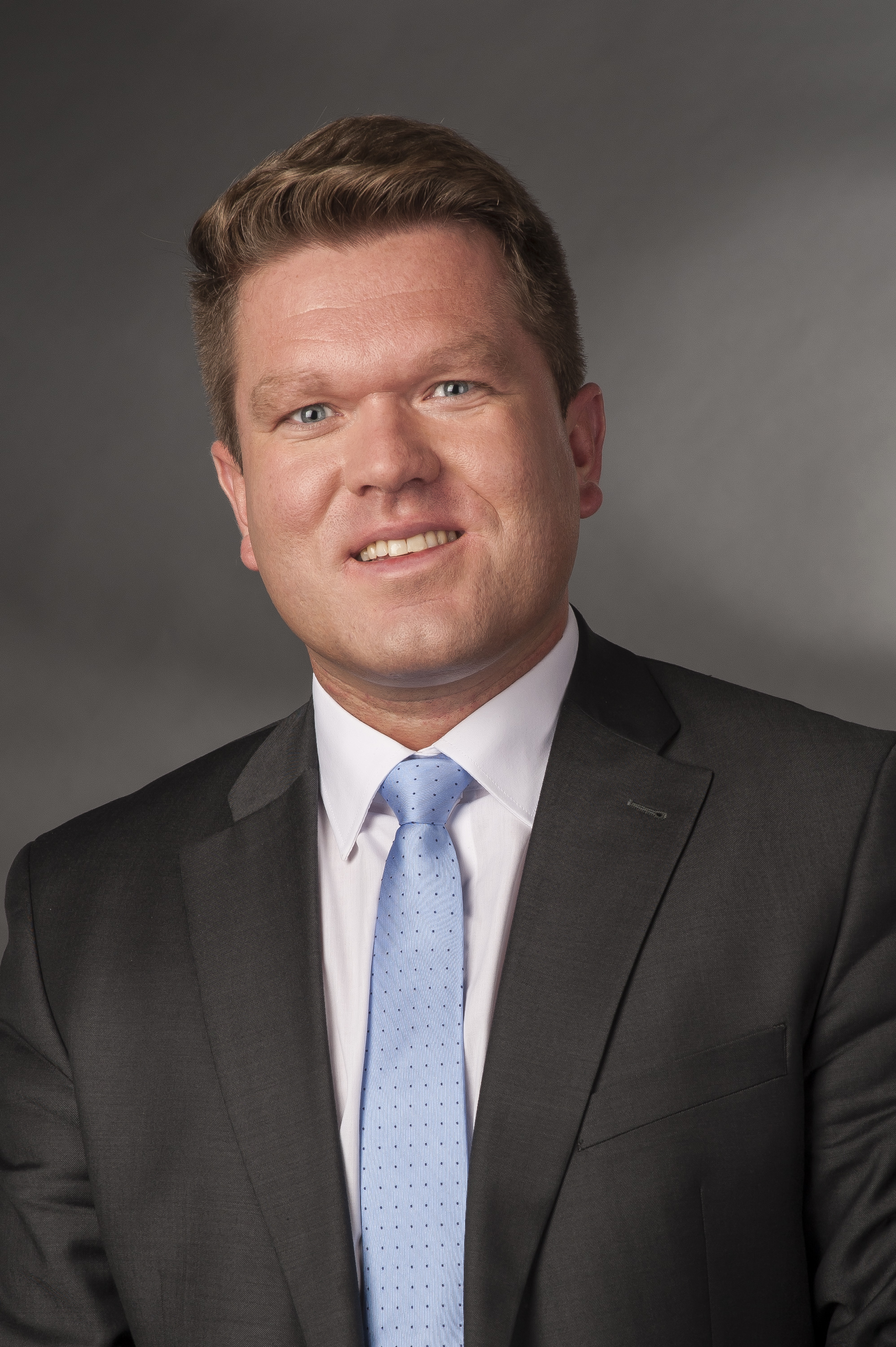 Florian Post (* 27. Mai 1981 in Neustadt a.d. Waldnaab (Oberpfalz)) ist Diplom-Kaufmann Univ. und Politiker (SPD).